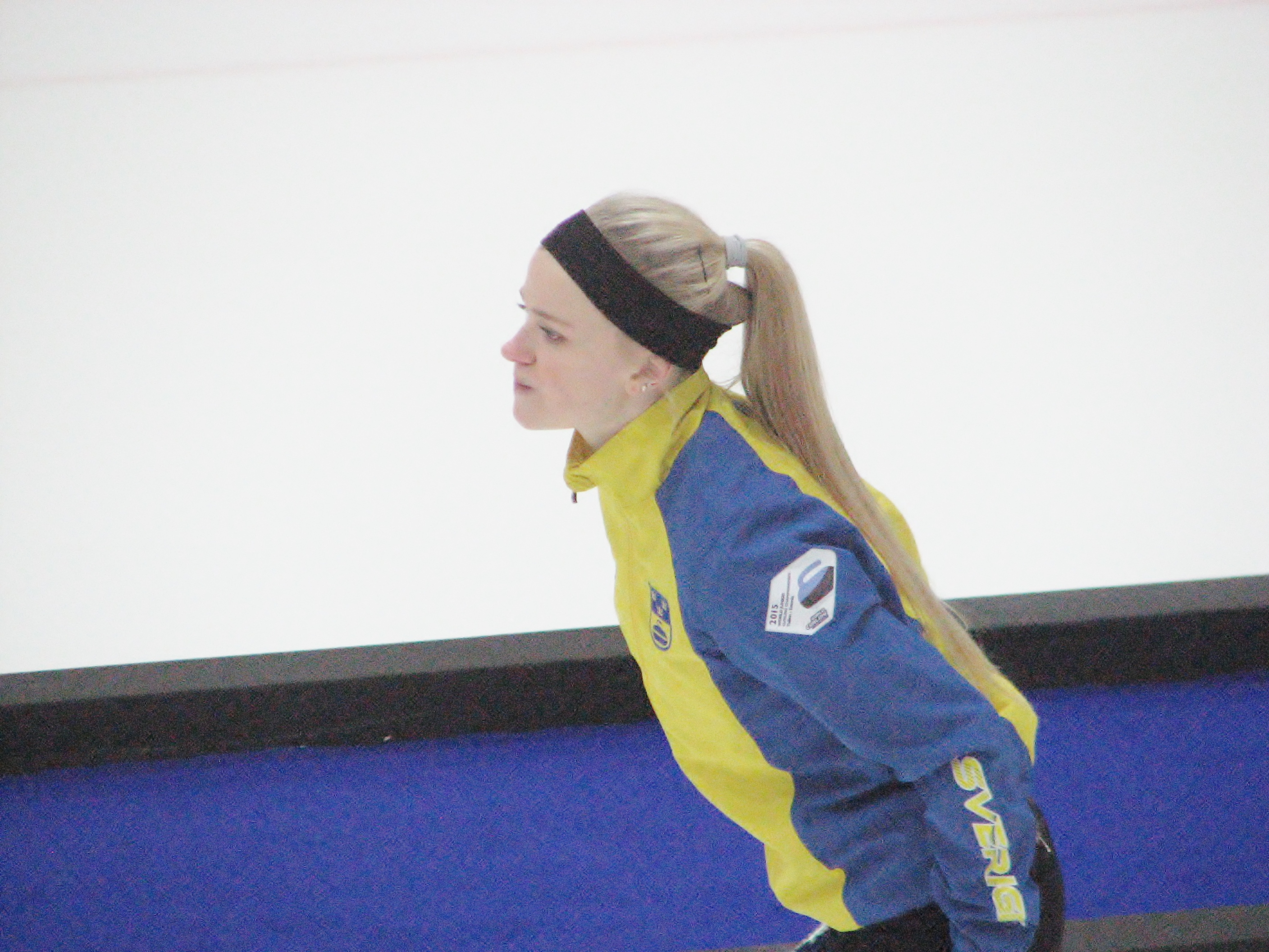 Isabella Wranå Rootsi naiskonnas 2015. aasta juunioride curlingu maailmameistrivõistlustel Tondi jäähallis